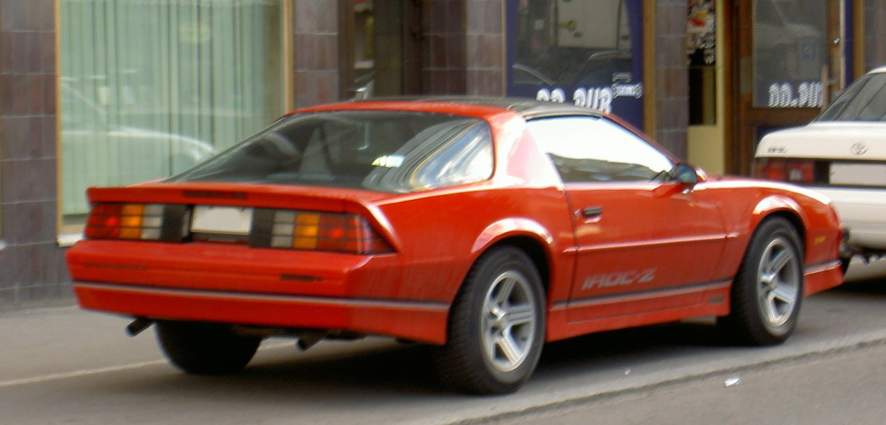 Chevrolet Camaro IROC-Z